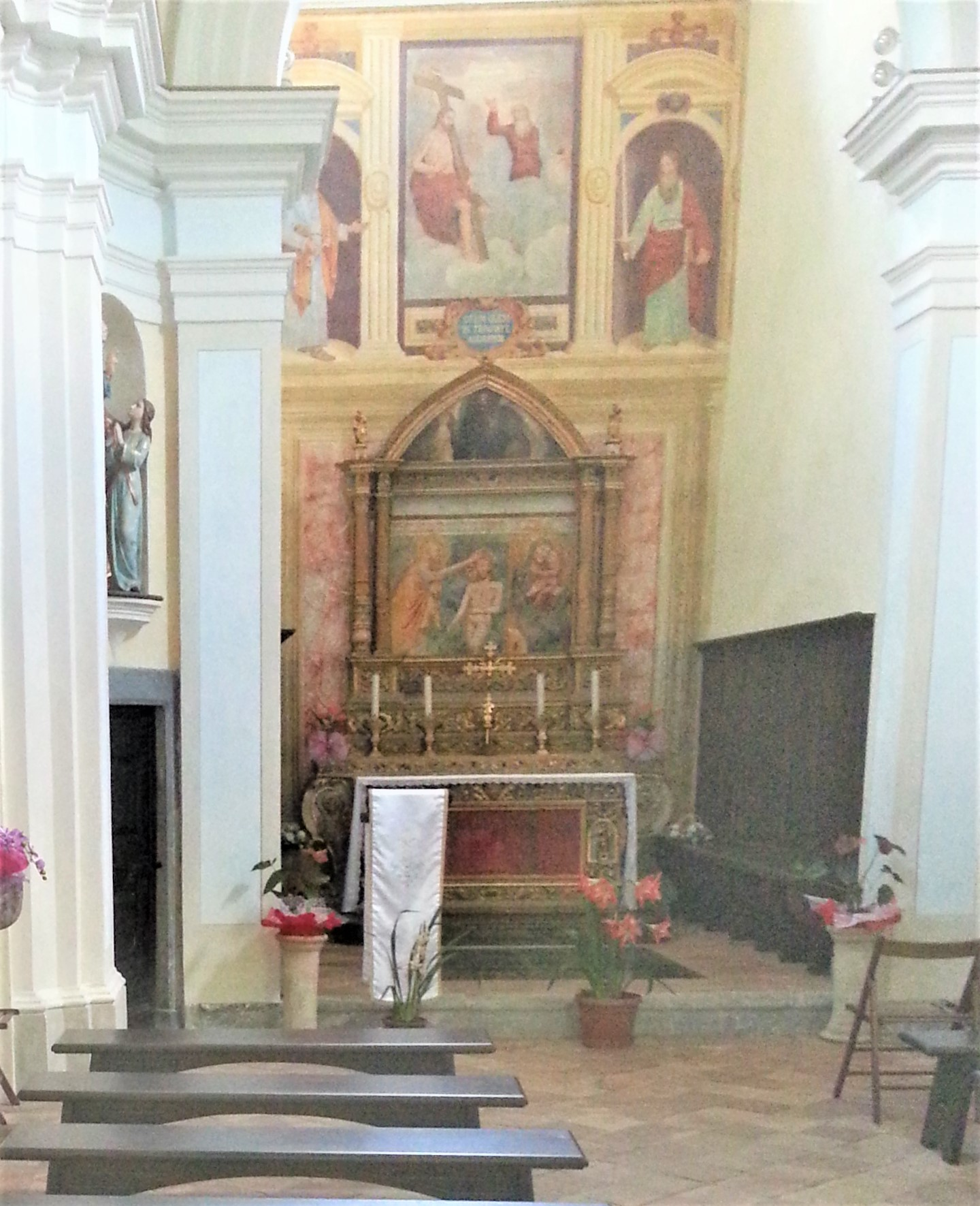 Chiesa di san Pietro parpticoalre dell'altare